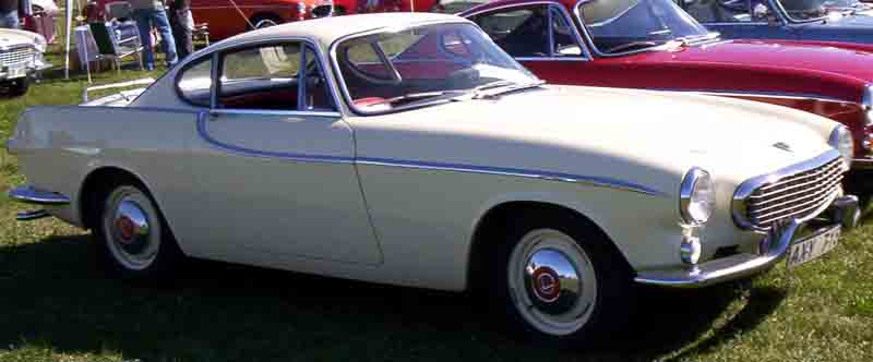 Volvo P1800 1963